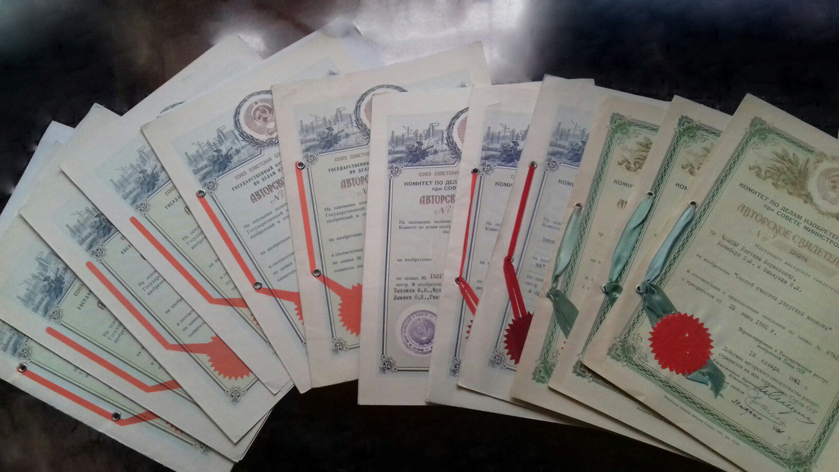 Свидетельства на изобретения